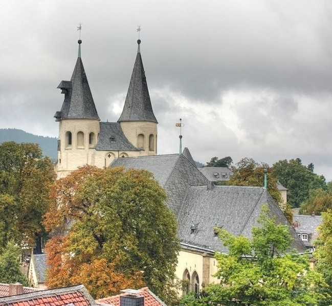 Jacobikirche